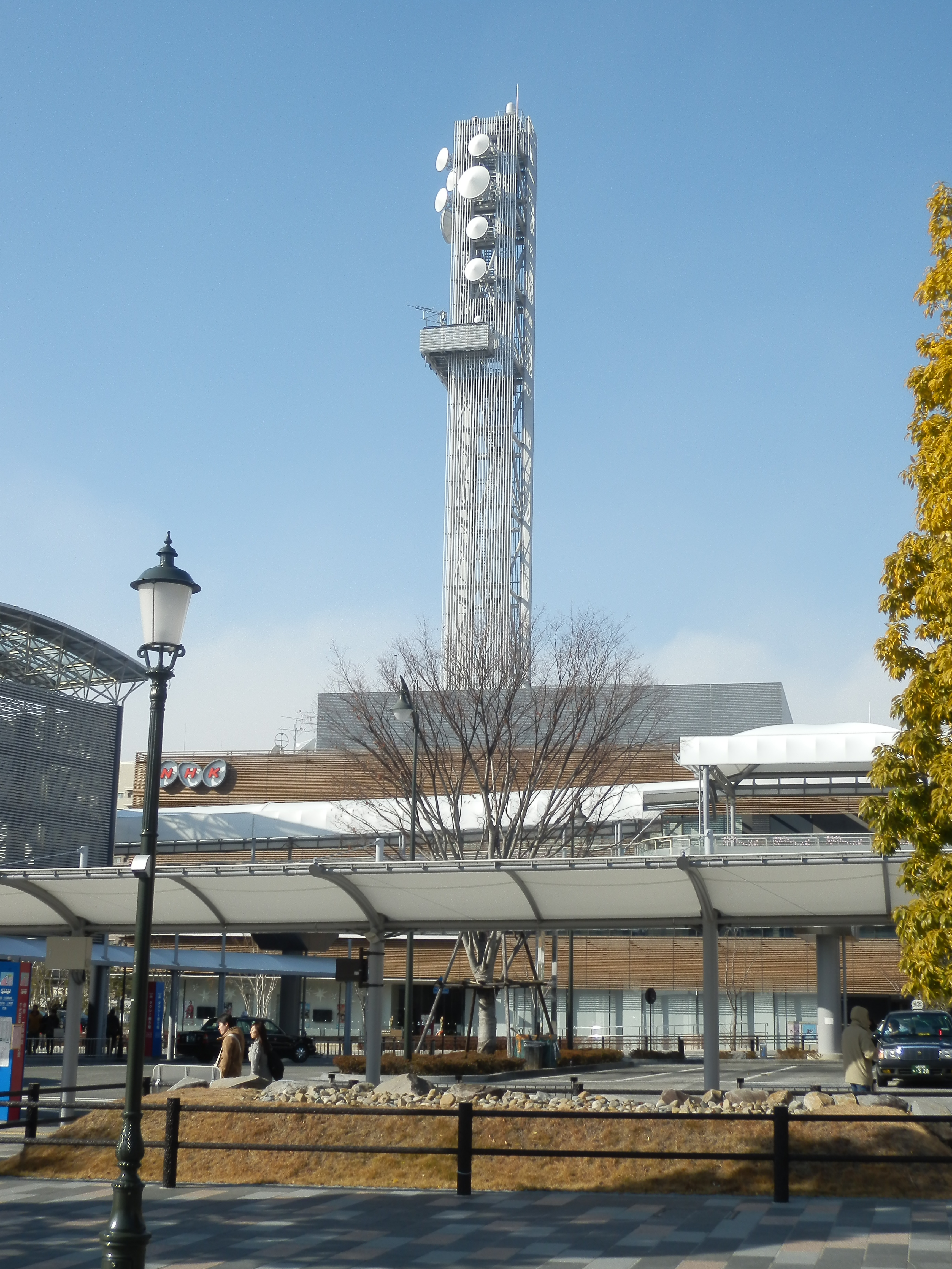 NHK甲府放送局（アンテナ含む全景）